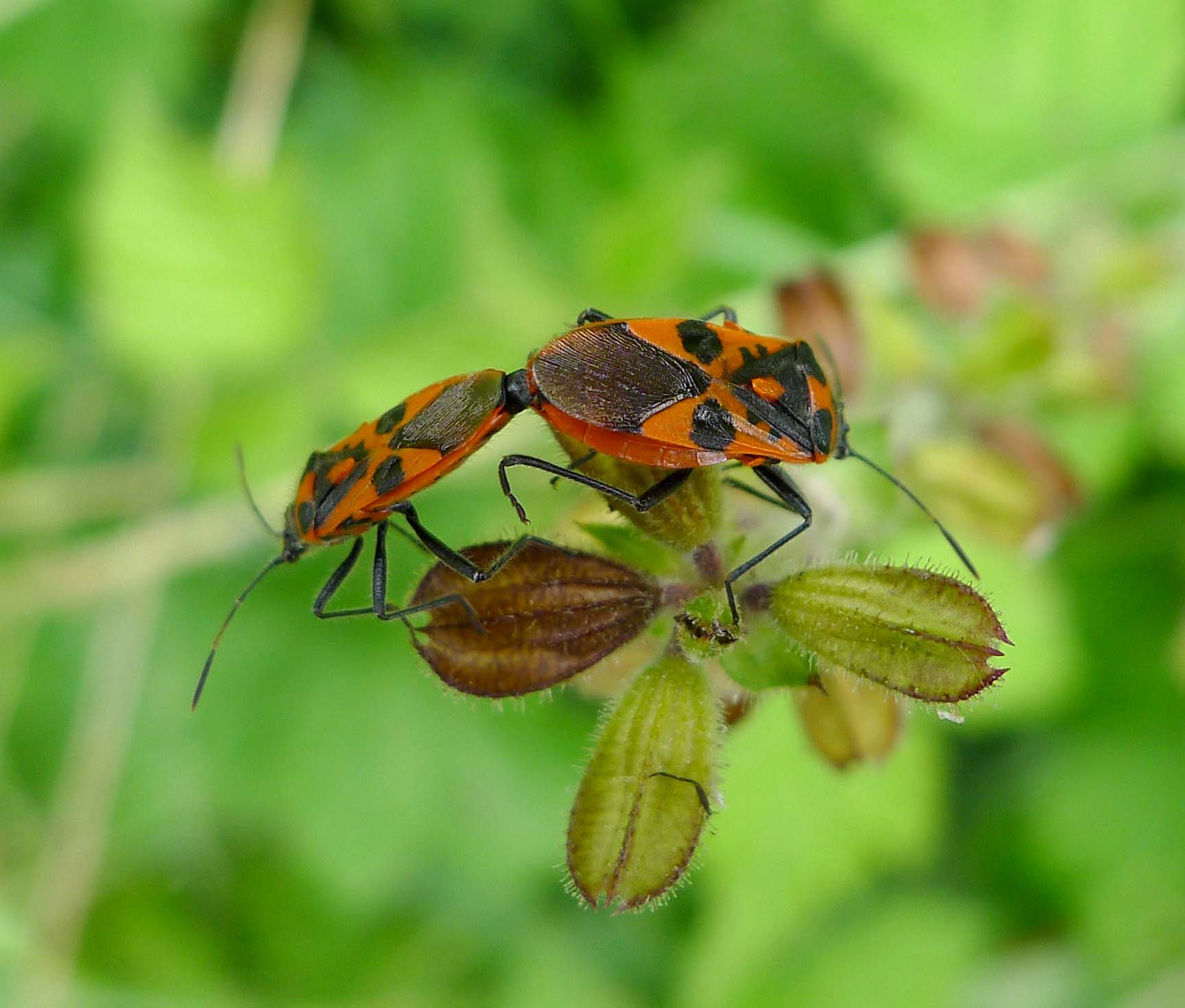 Corizus hyoscyami. Rhopalidae